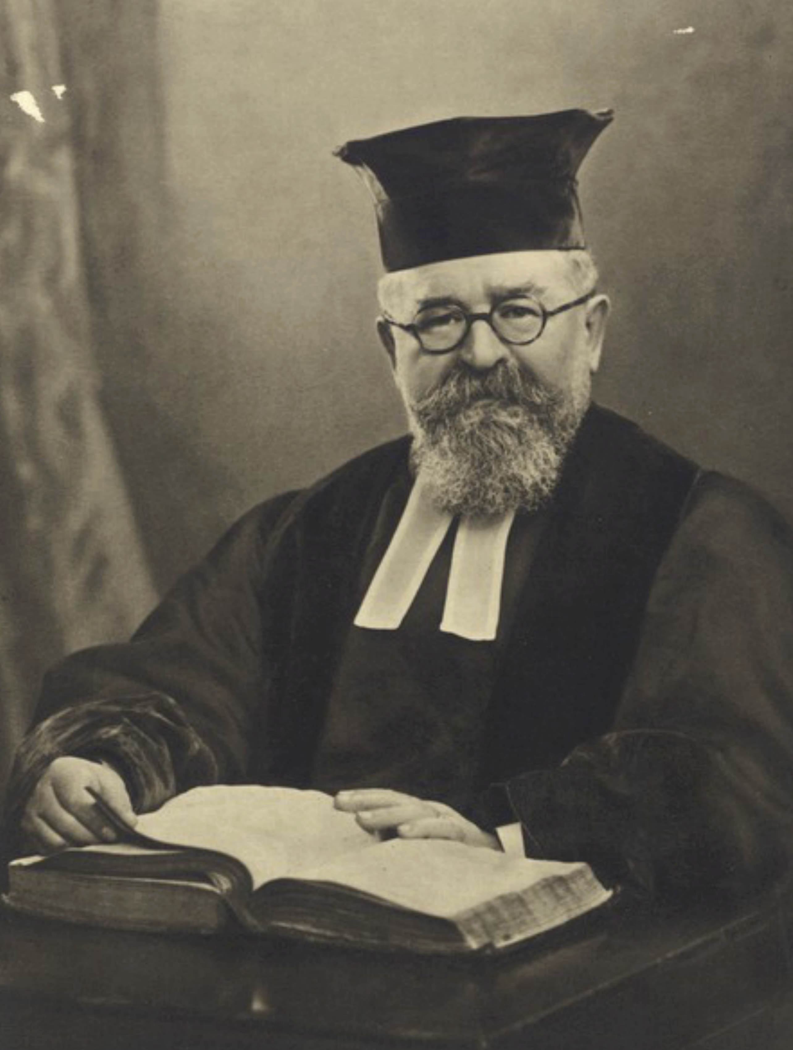 קטע מתוך עלון פרסומת לספר, ובו דיוקן הרב הרץ. עלון זה ראה אור בסוף שנות העשרים.